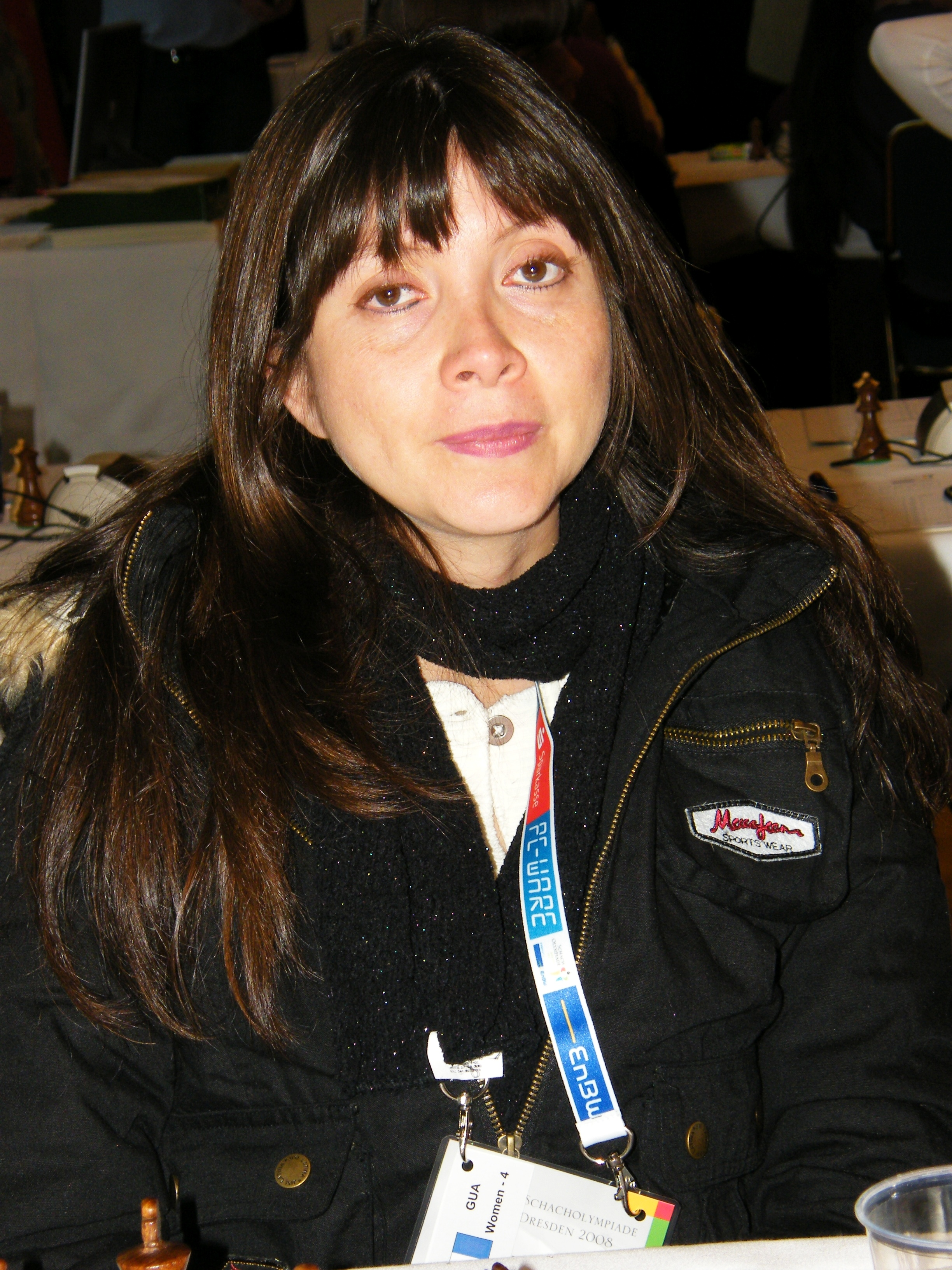 Karla Monterroso bei der 38. Schacholympiade in Dresden 2008